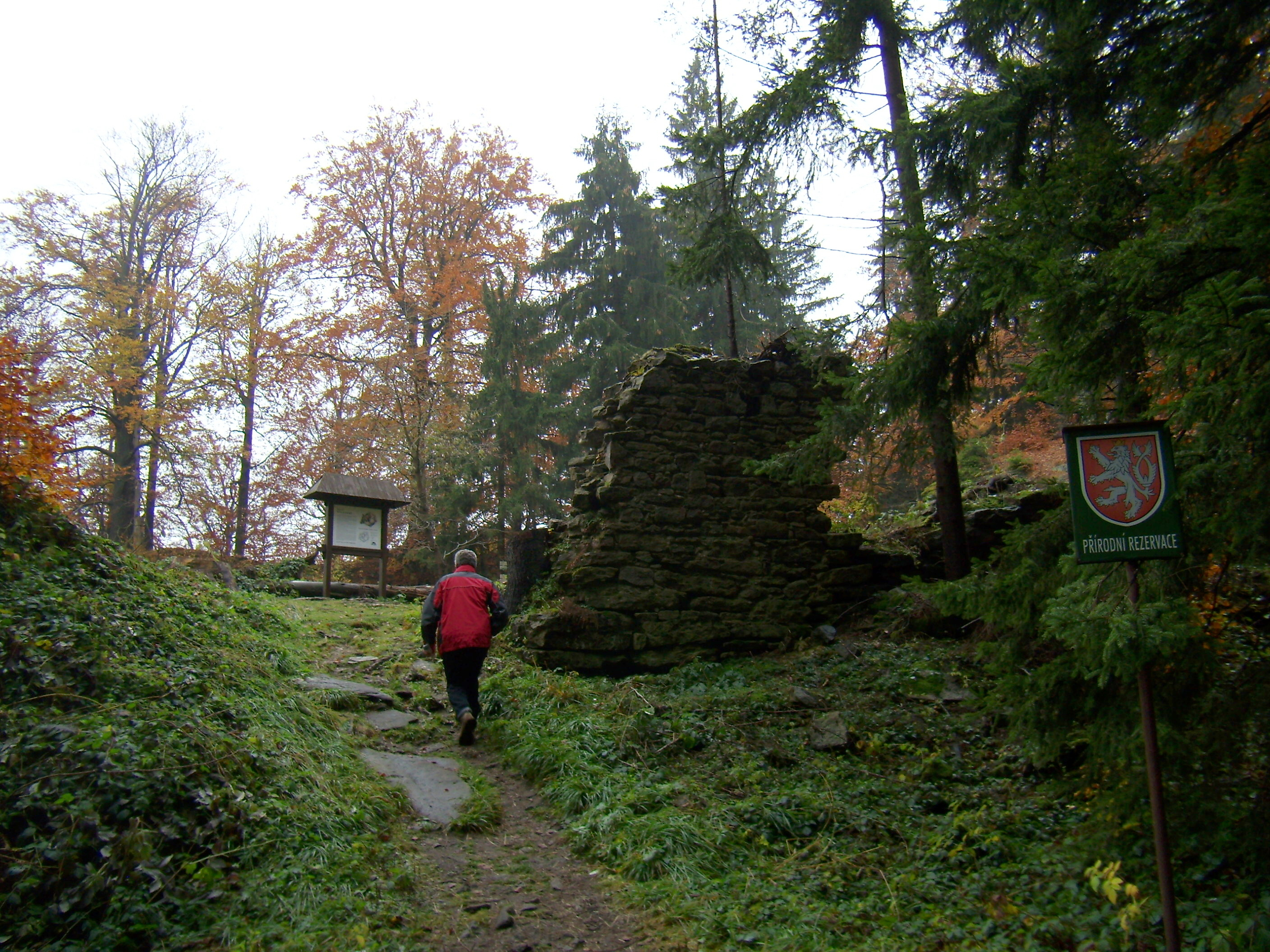 Štamberk - zřícenina hradu